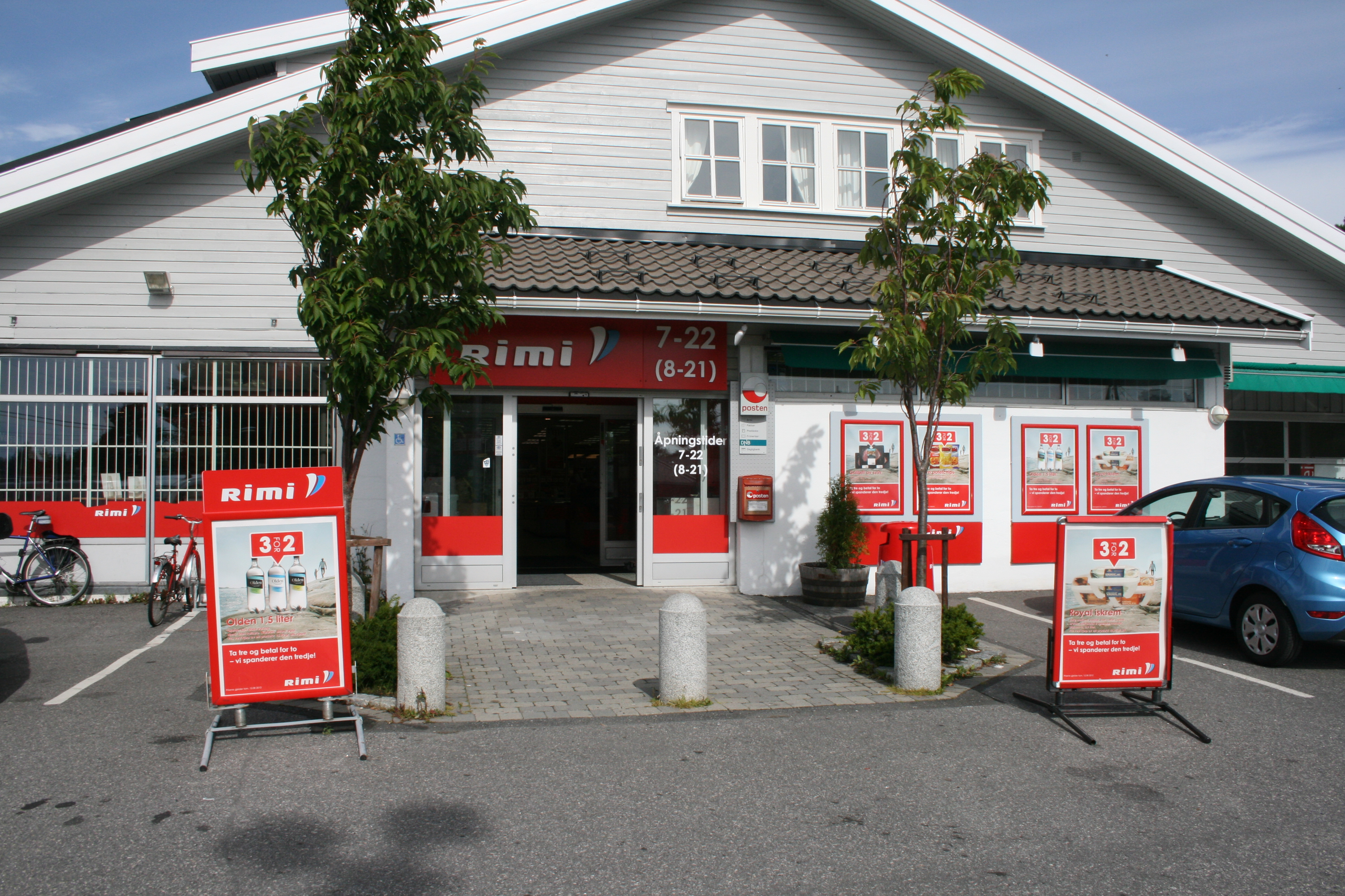 Rimi Randvik